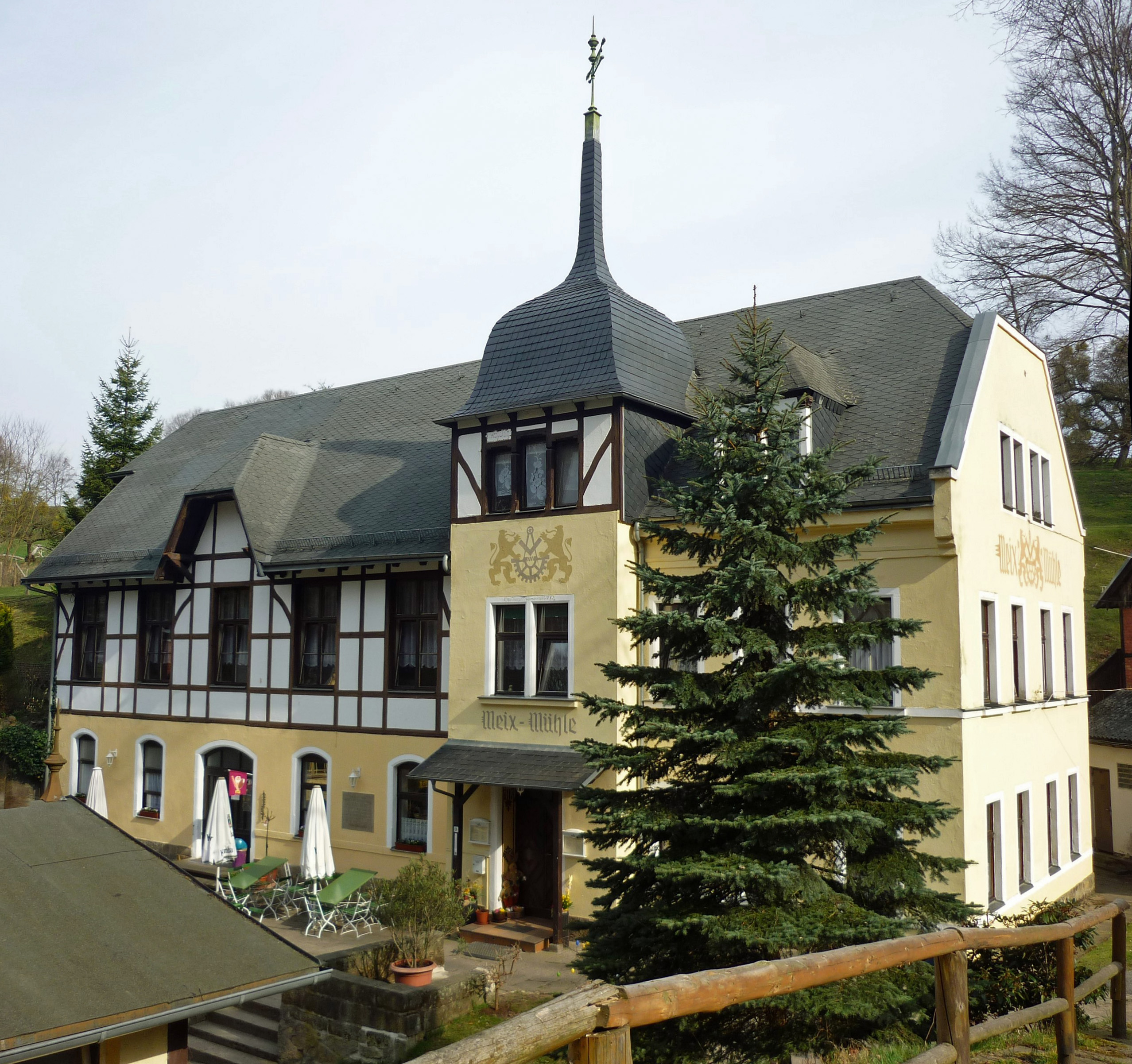 Meixmühle in Dresden-Borsberg